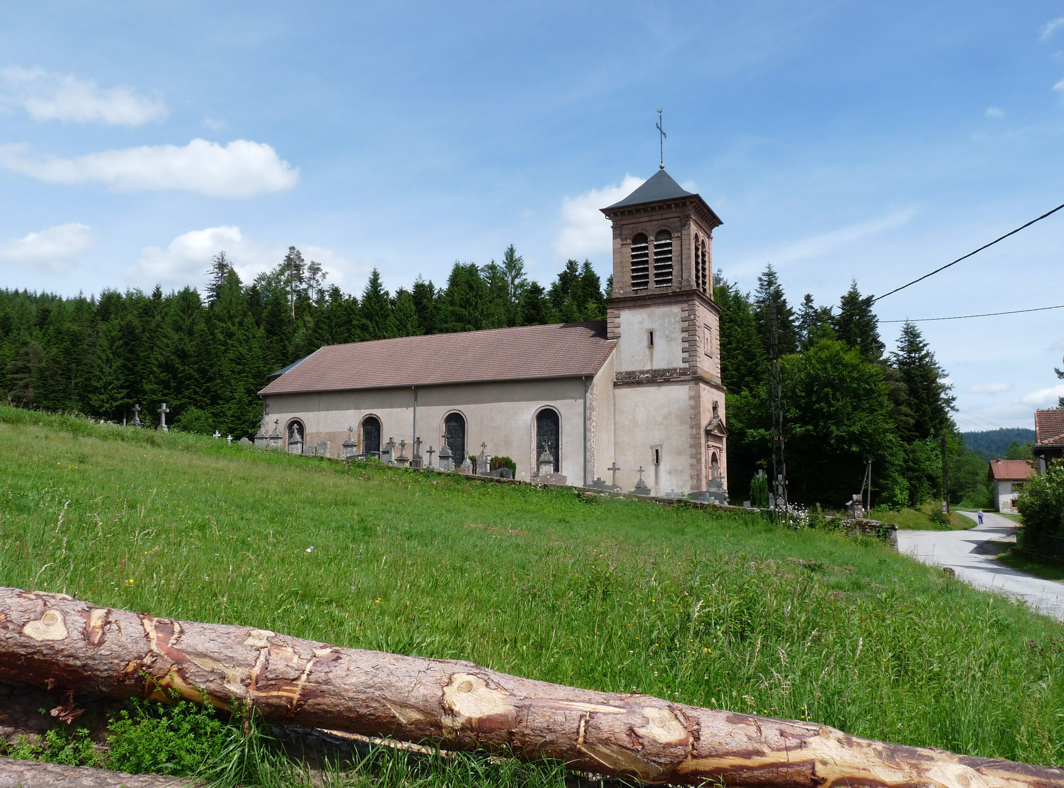 Eglise des Rouges-Eaux (Vosges)